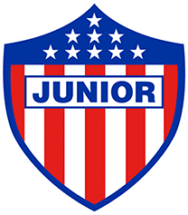 Junior de Barranquilla Logo 2018